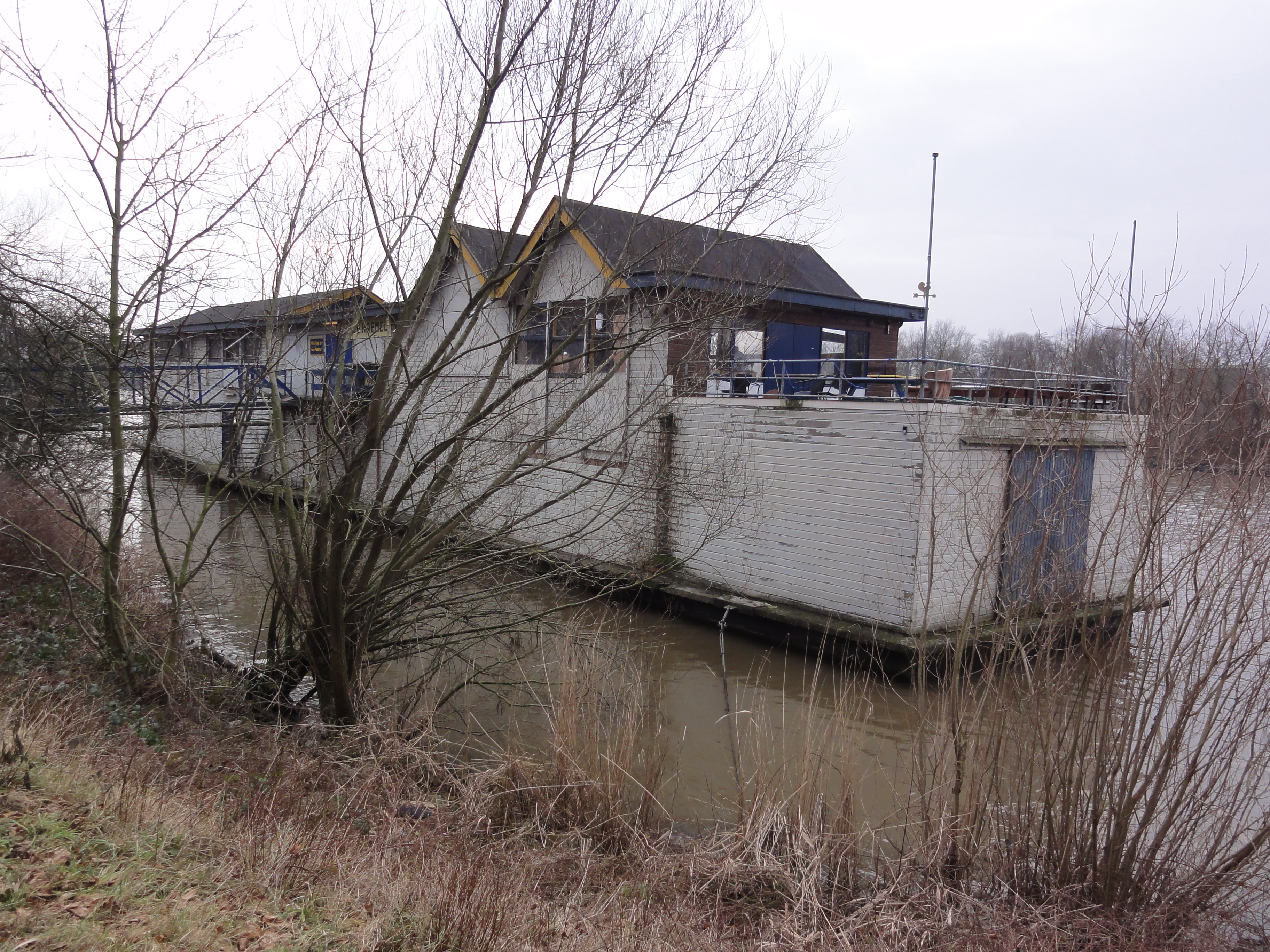 Nijmegen, Maas-Waalkanaal, botenhuis roeivereniging Phocas aan het Maas-Waalkanaal